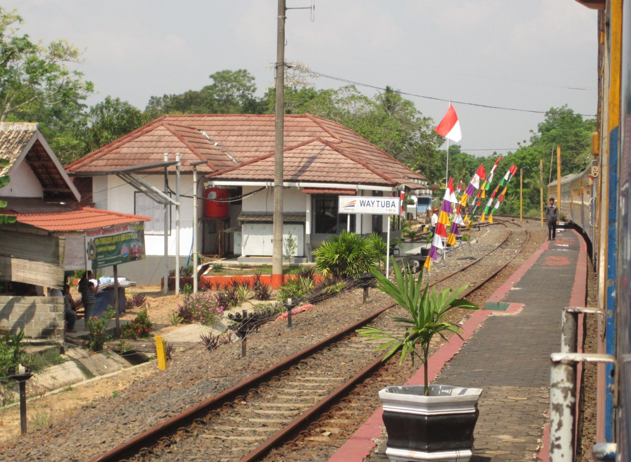 Stasiun Waytuba.